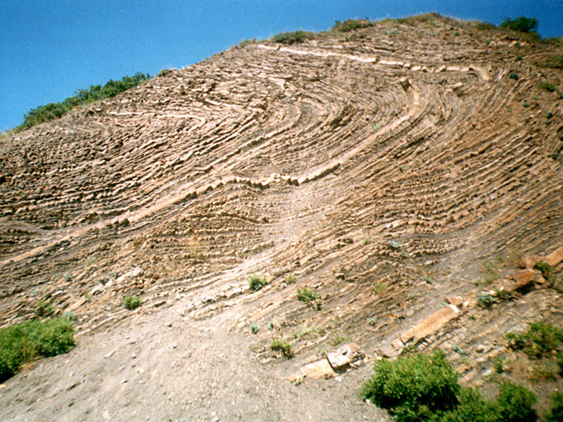 Флиш